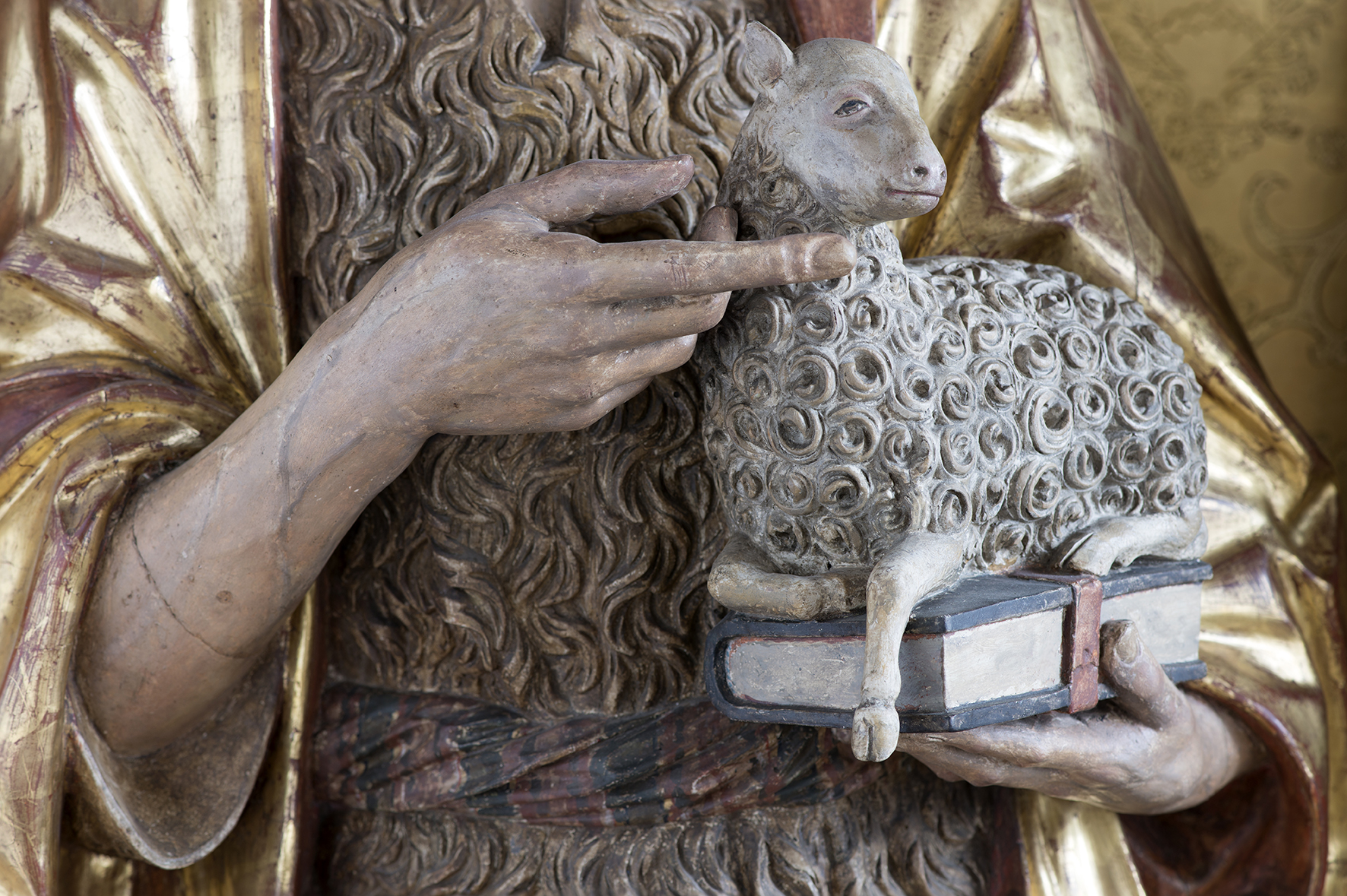 Der Täufer zeigt auf Jesus, dem Lamm Gottes